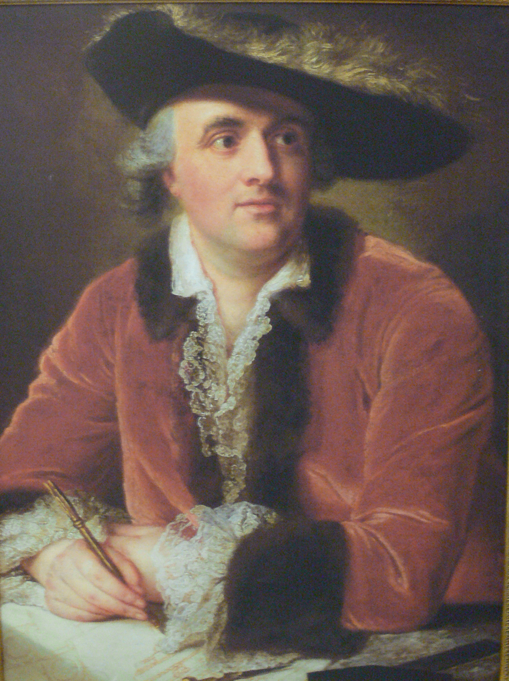 Reproduktion (im Schlosstheater Schwetzingen) nach einem Original im Stadtmuseum Düsseldorf